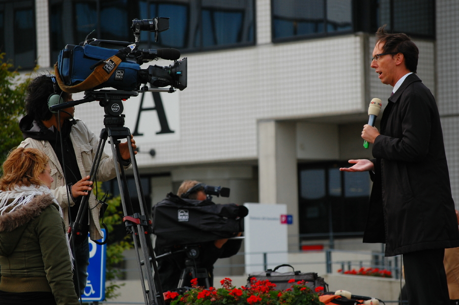 Journalist Michiel Bosgra tijdens een item over de val van de DSB Bank